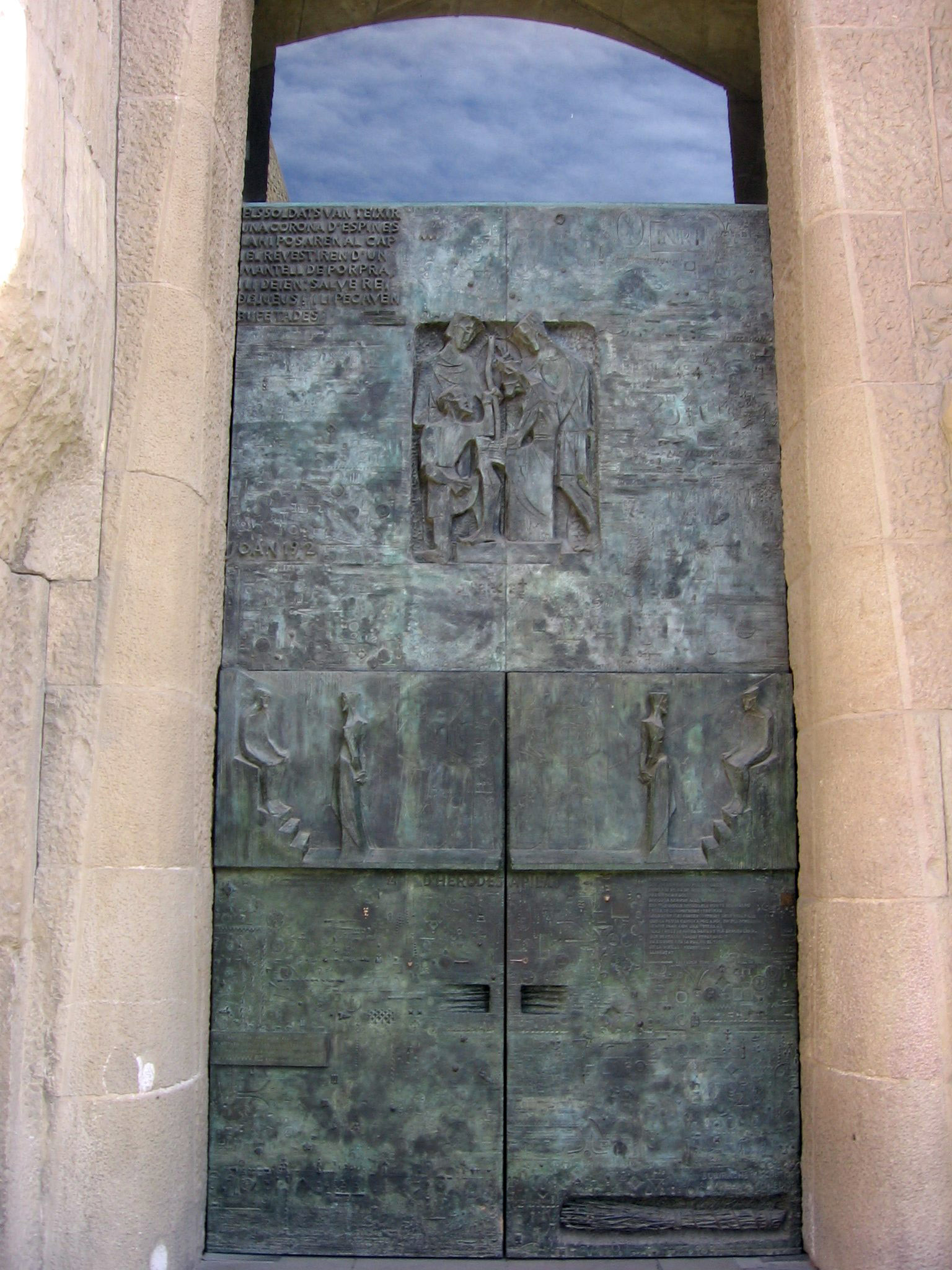 Puerta de la Coronación de Espinas, Fachada de la Pasión, Sagrada Familia (Barcelona).